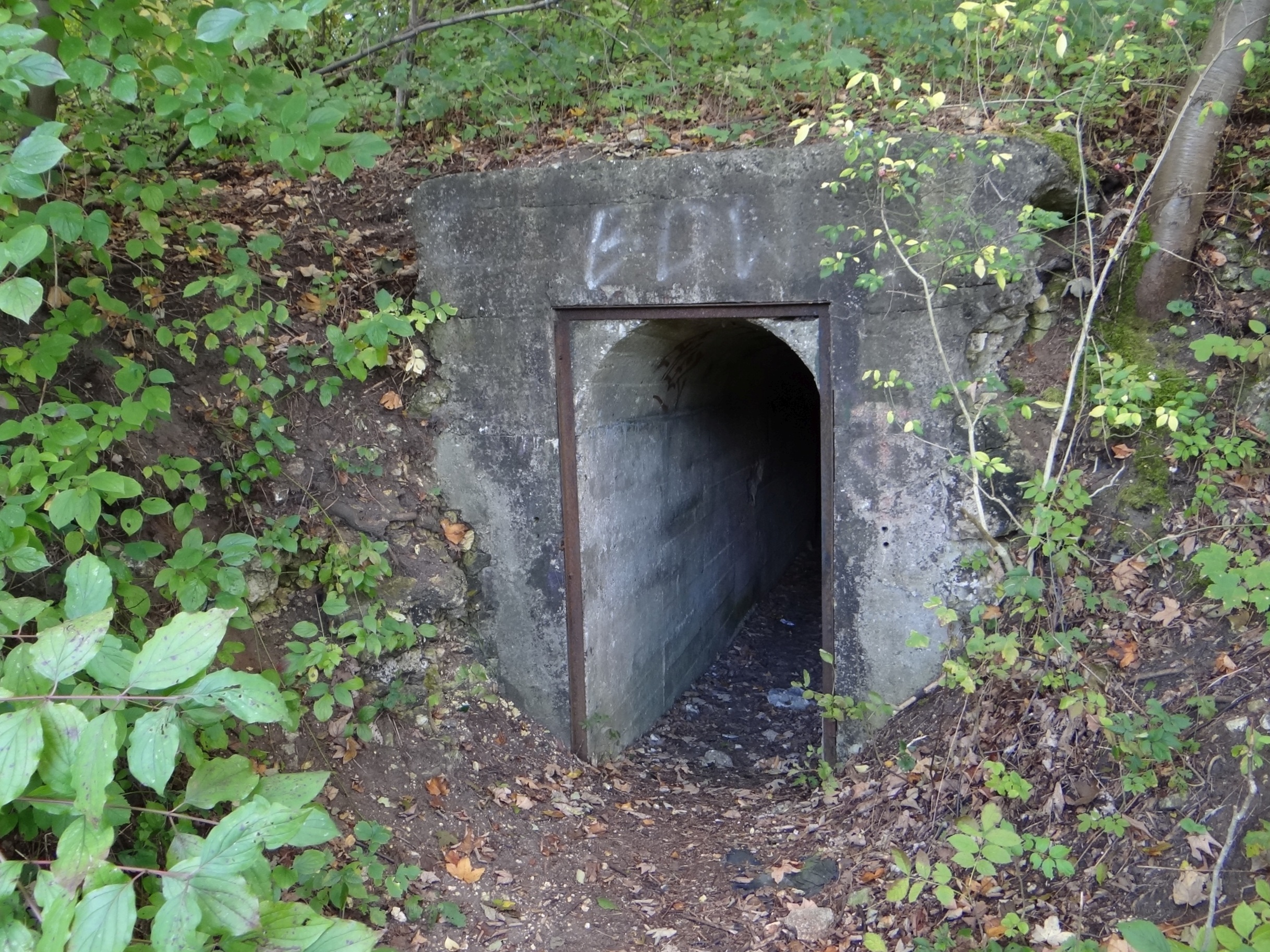 Kawerna w Wielkanocy na osiedlu Bodzów w Krakowie